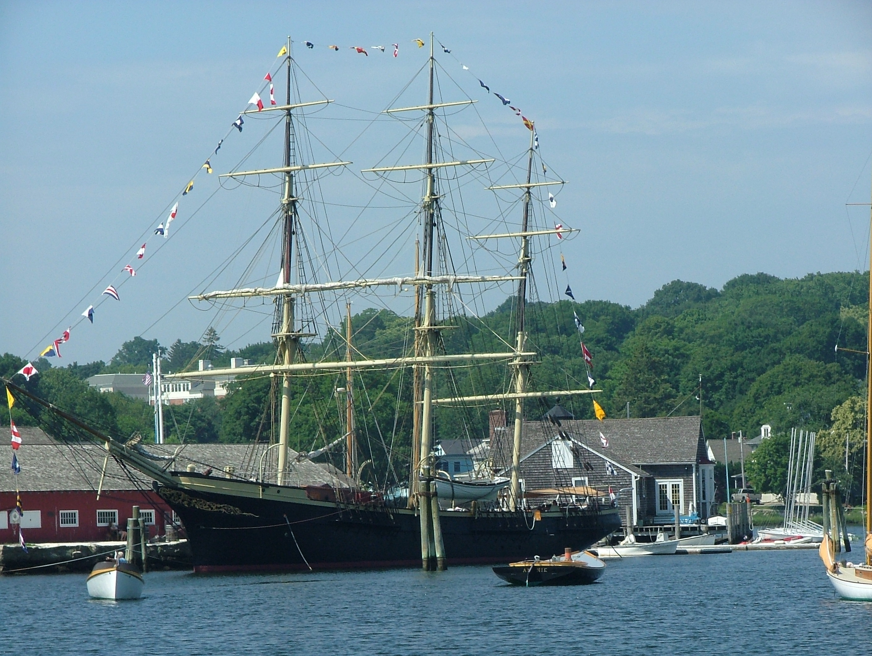 Joseph Conrad, tidligere Georg Stage.